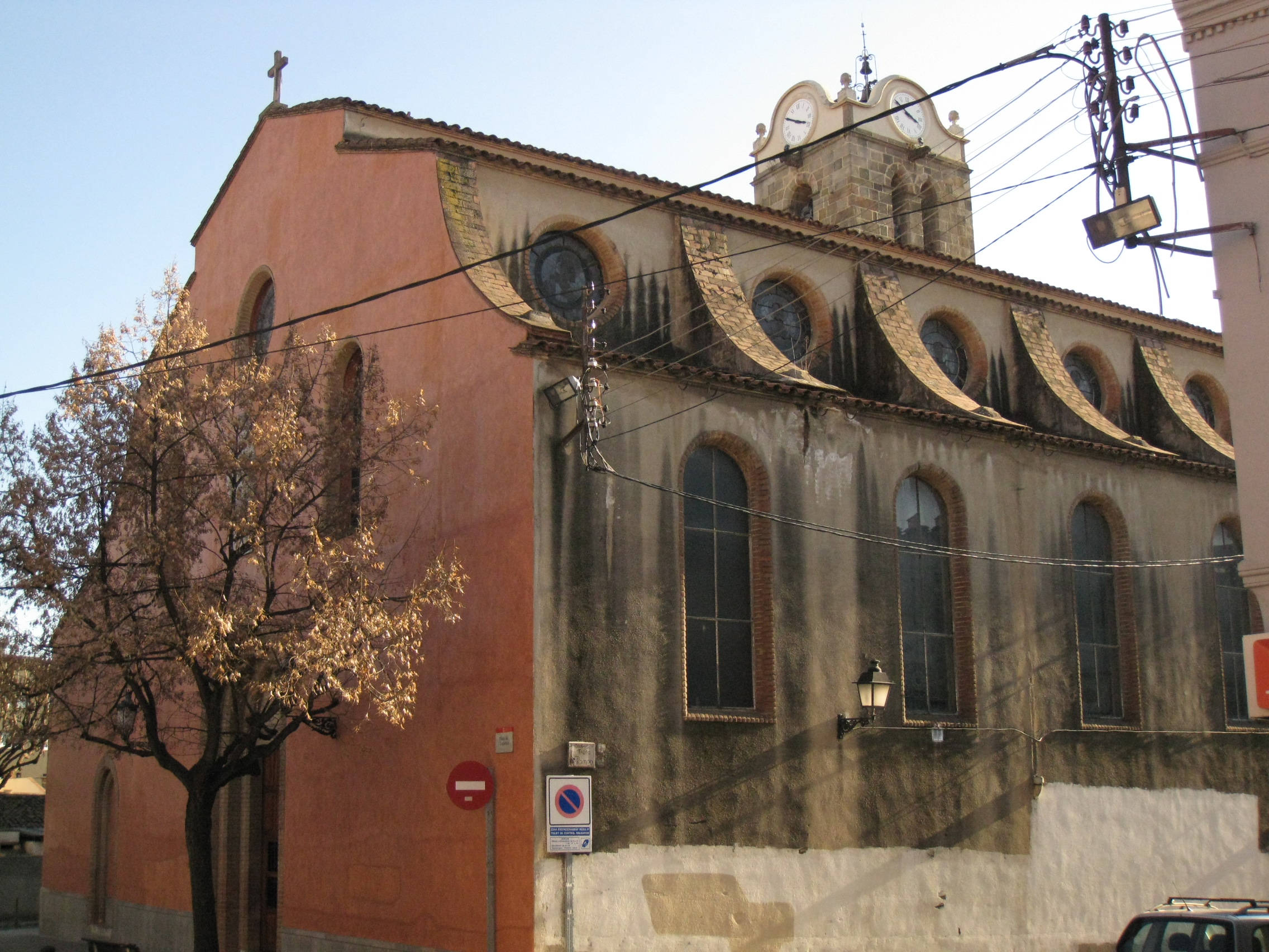 Església de Sant Vicenç (Mollet del Vallès)